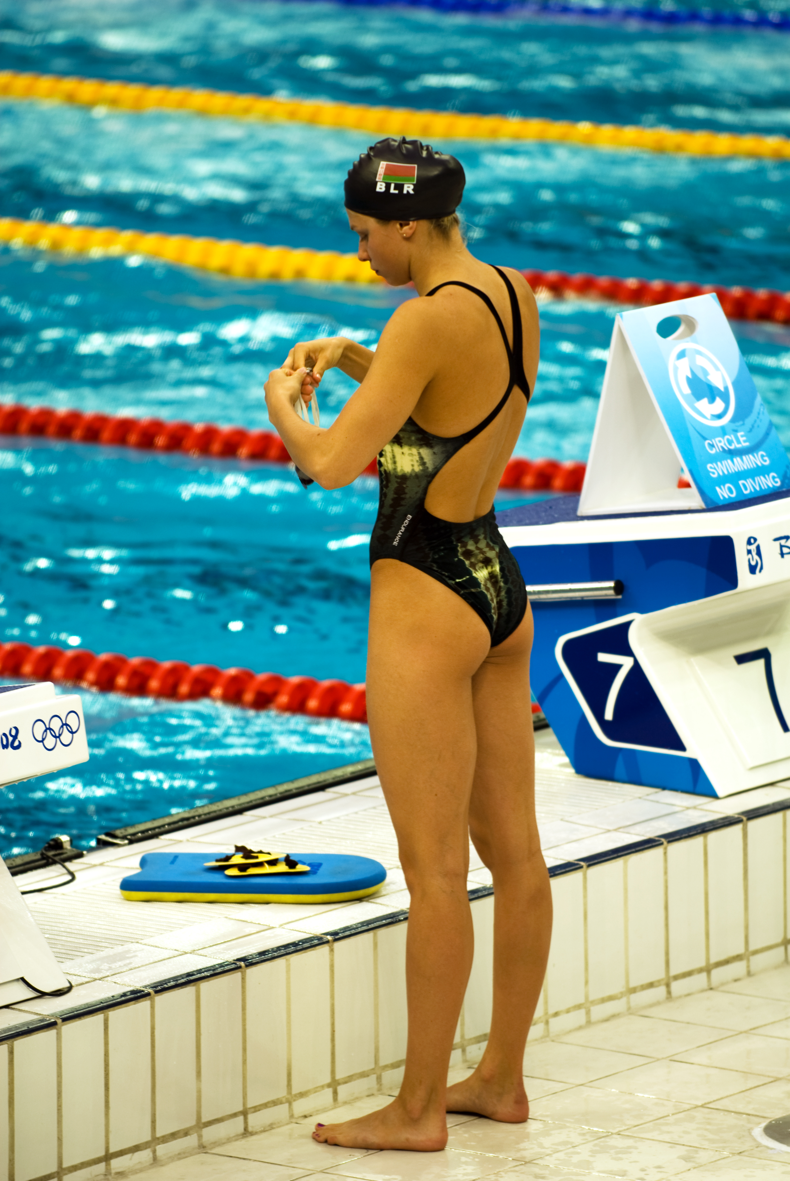 Aleksandra Gerasimenya,a Belarussian swimmer at the Beijing Olympics.